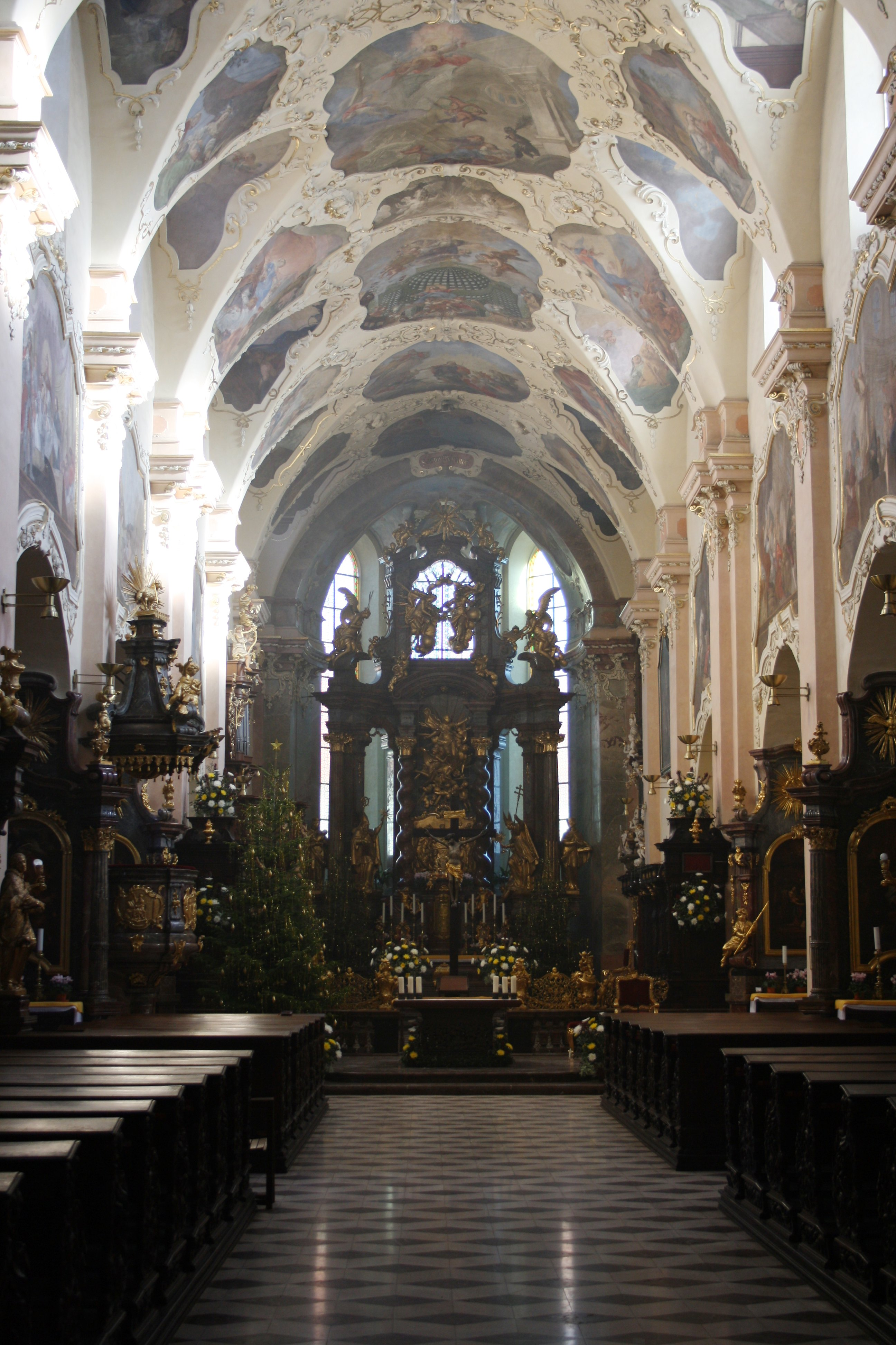 Bazilika Nanebevzetí Panny Marie na Strahově